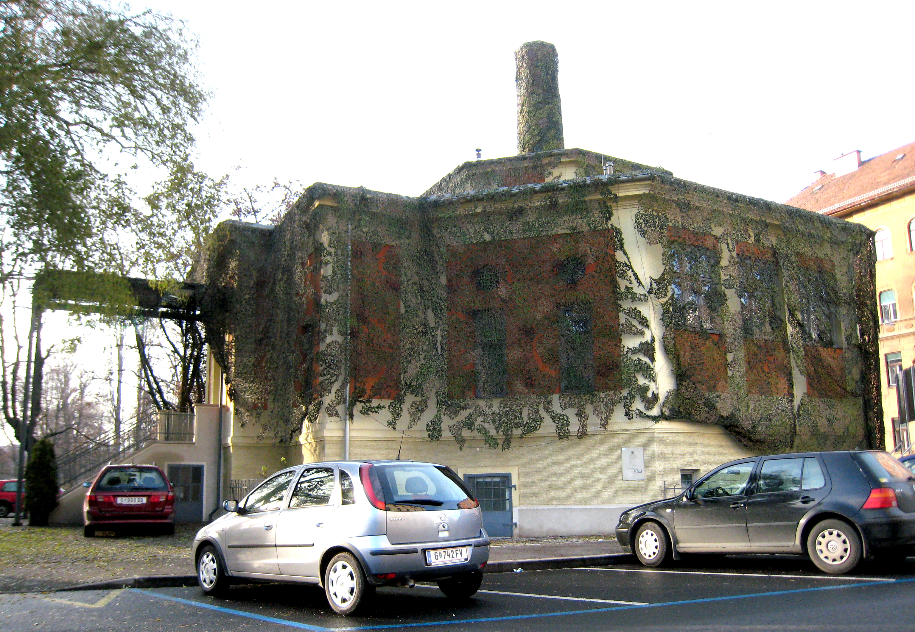 ‚Camouflage' von Timm Ulrichs 2007/08 im MUWA